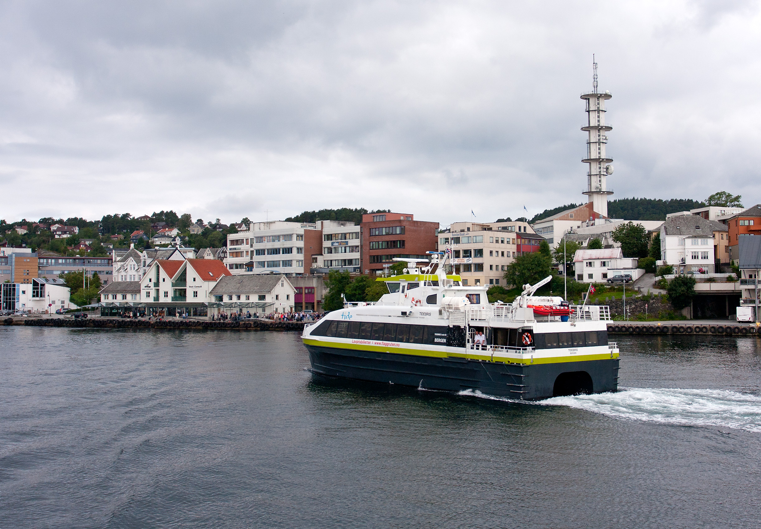 Catamaran 'Tidebris' / Leirvik, Norway